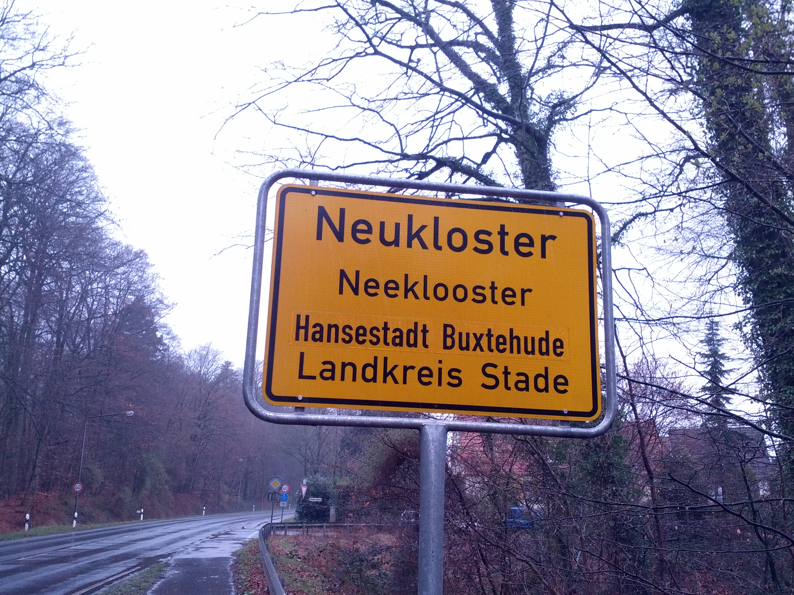 Oortsschild mit den Naam op Hoochdüütsch un op Plattdüütsch